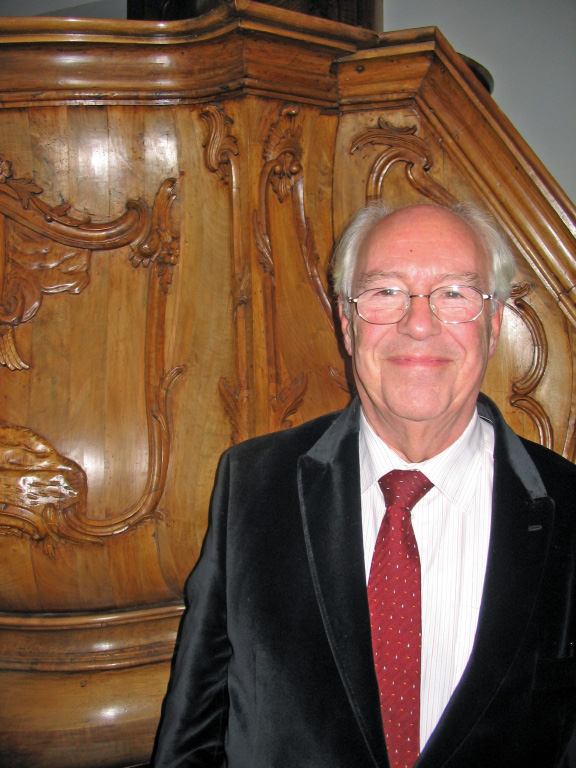 Portret van Hans van den Bergh